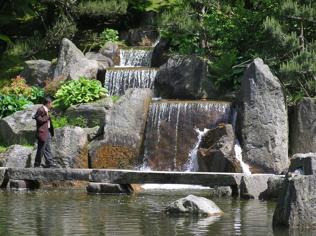 foto Mike, 22 mei 2005